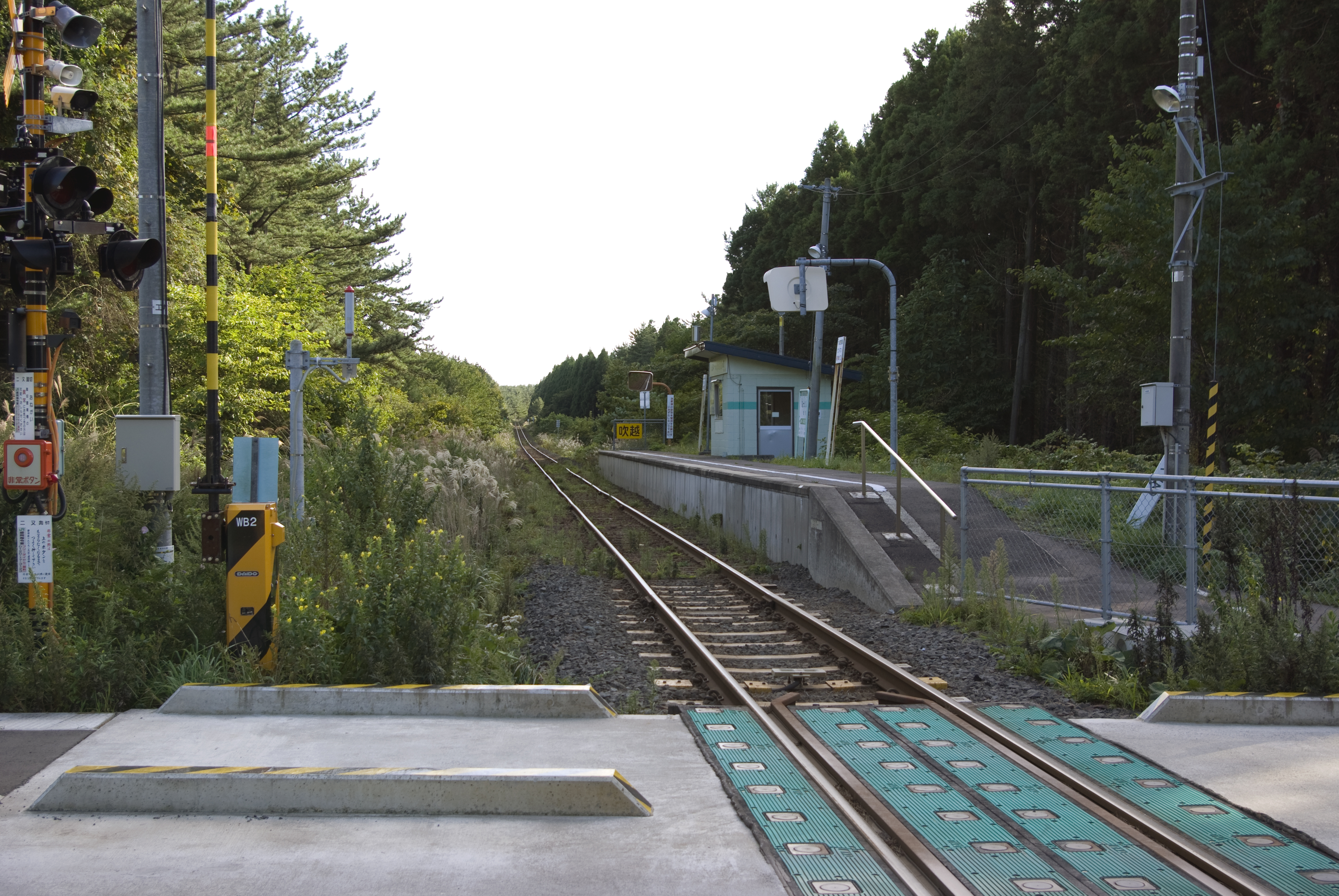 JR大湊線吹越駅